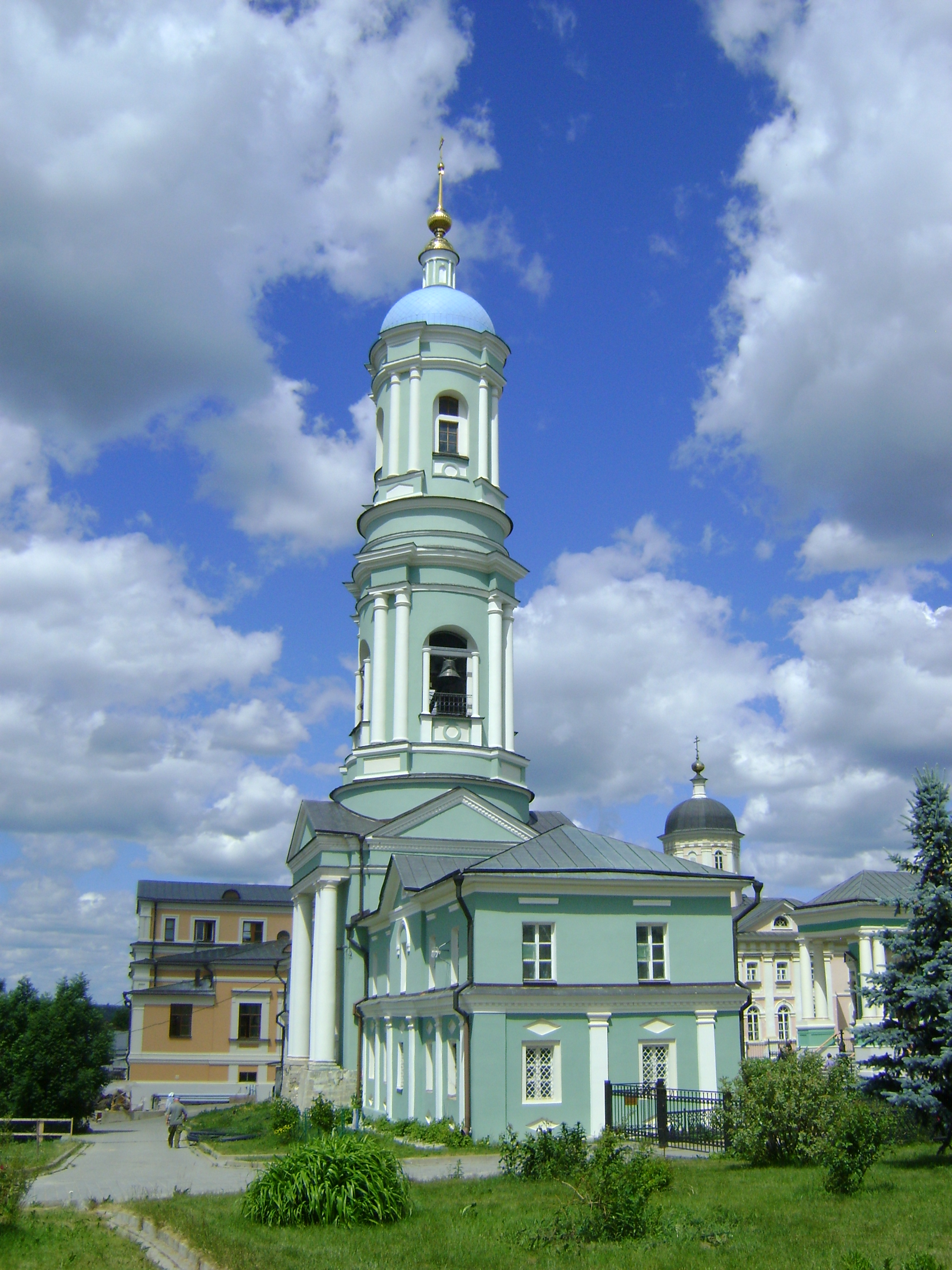 Колокольня с Братским корпусом